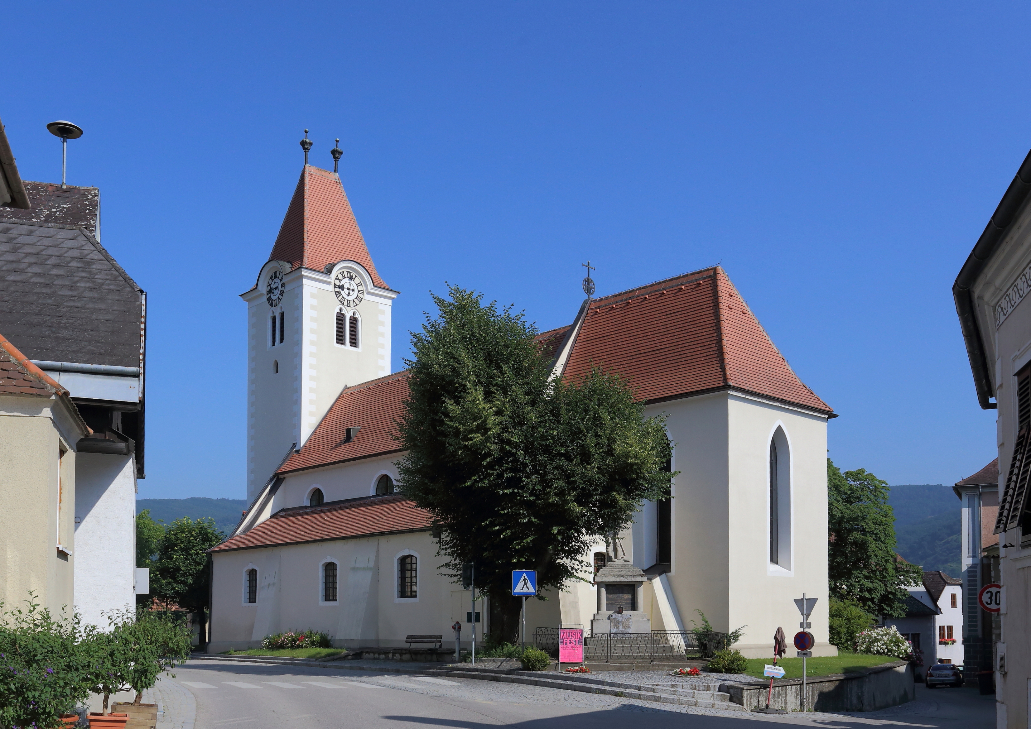 Die römisch-katholische Pfarrkirche hl. Jakob d. Ä. in Rossatz, ein Ortsteil der niederösterreichischen Marktgemeinde Rossatz-Arnsdorf. Ein Sakralbau mit einem dreischiffigen basilikalen Langhaus, das im Kern spätromanisch ist (1. Viertel des 14. Jahrhunderts), und einem mächtigen, vorgestellten gotischen Westturm. Der zweijochige Chor stammt aus der zweiten Hälfte des 14. Jahrhunderts und hat ein Kreuzrippengewölbe auf Konsolen. Die Einrichtung ist überwiegend neugotisch.